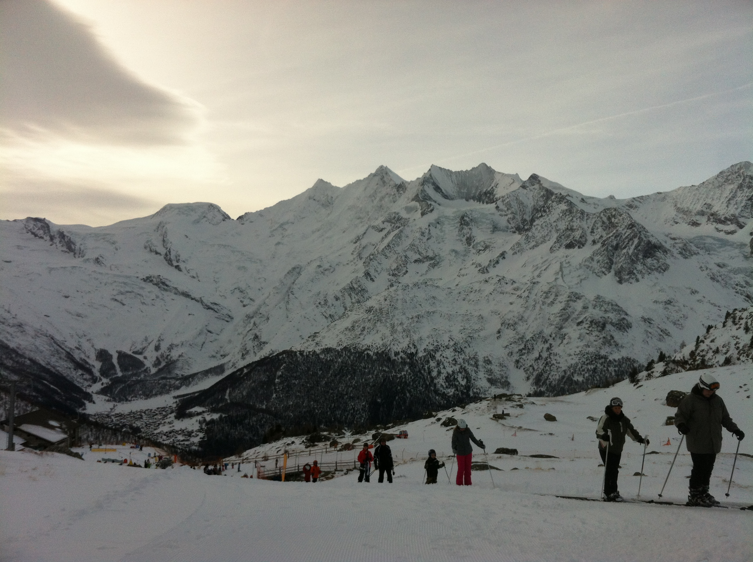 Тауға шаңғымен көтерілу сәті, Швейцария